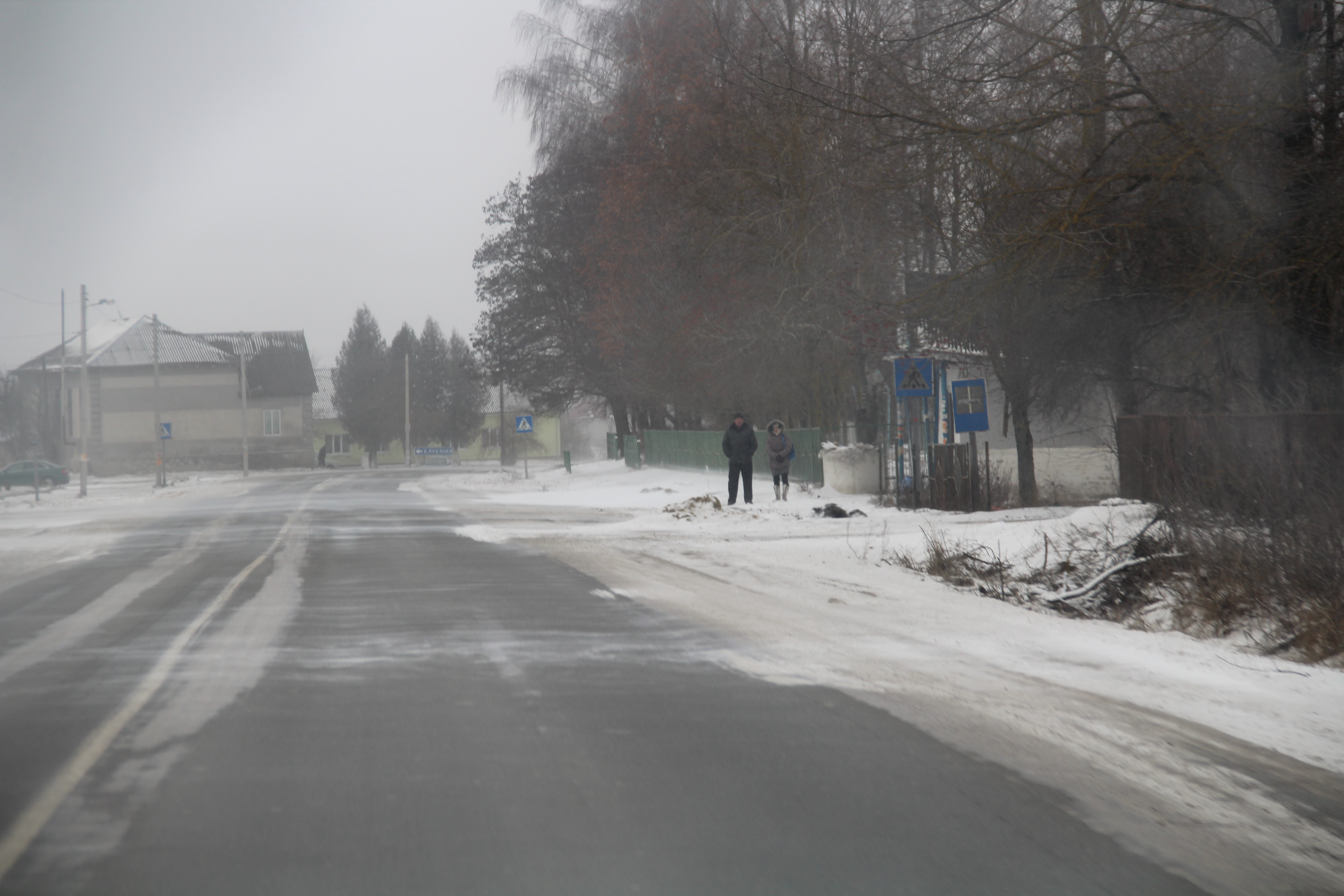 Фото